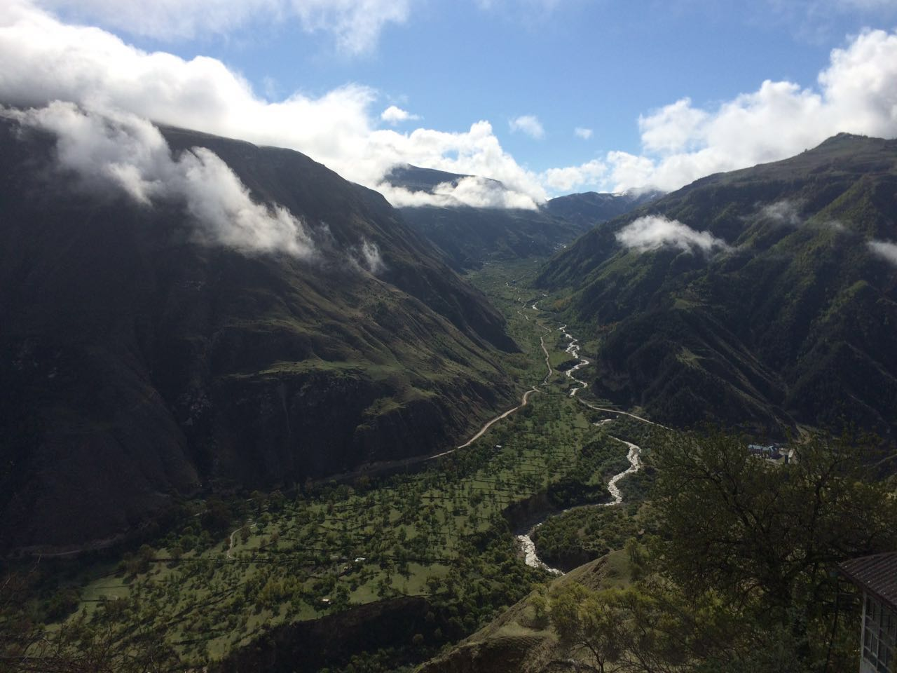 Тляратинский заказник: Тляратинский район, Дагестан This image is related to the protected area of Russia number 0500039